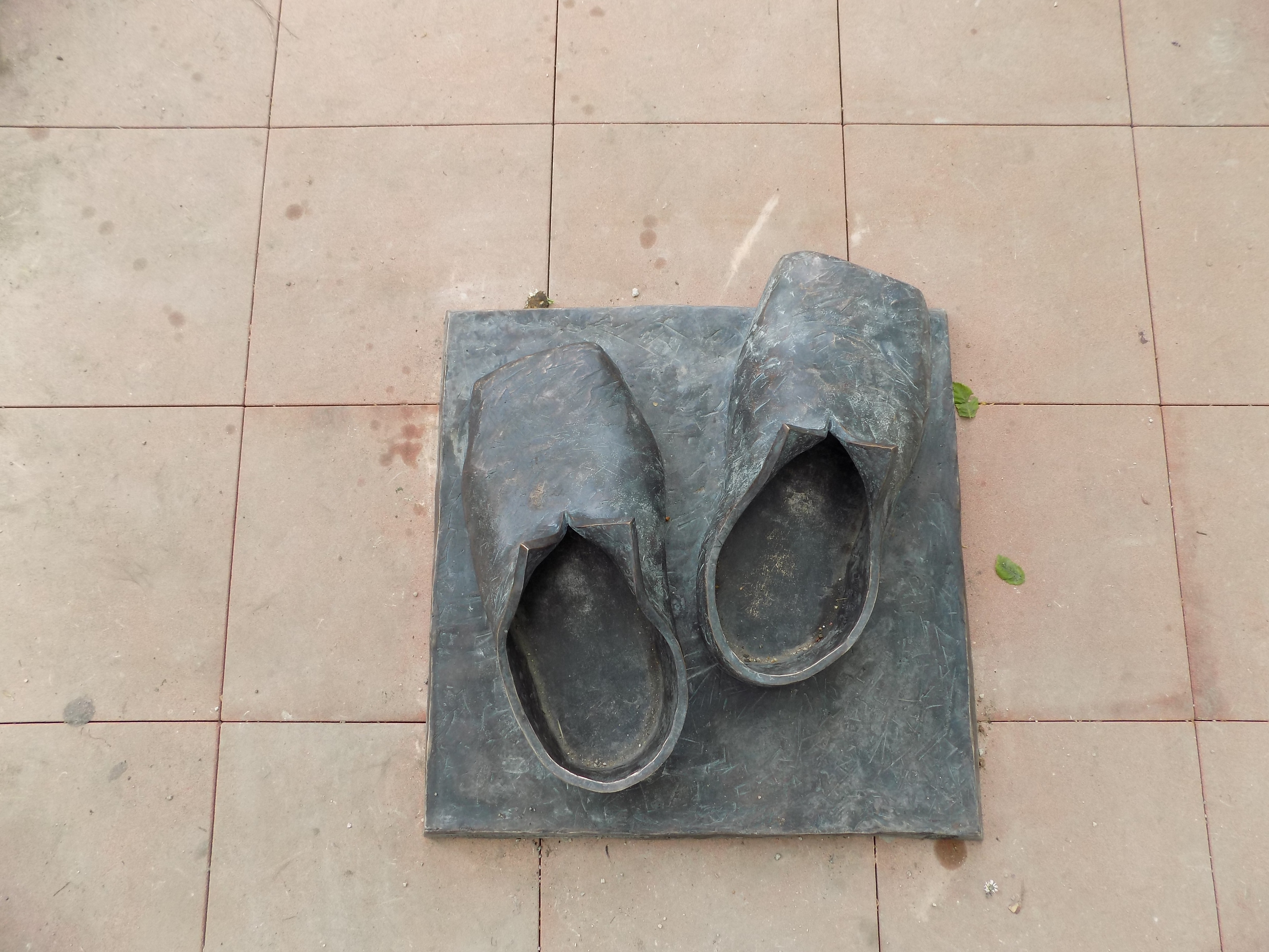 Die Großen Schuhe Luthers (Detail)